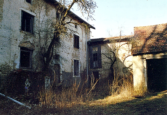 Gerbonvaux, Corps de ferme vue de la cour (© Francis MONTIGNON) GFDL Francis MONTIGNON